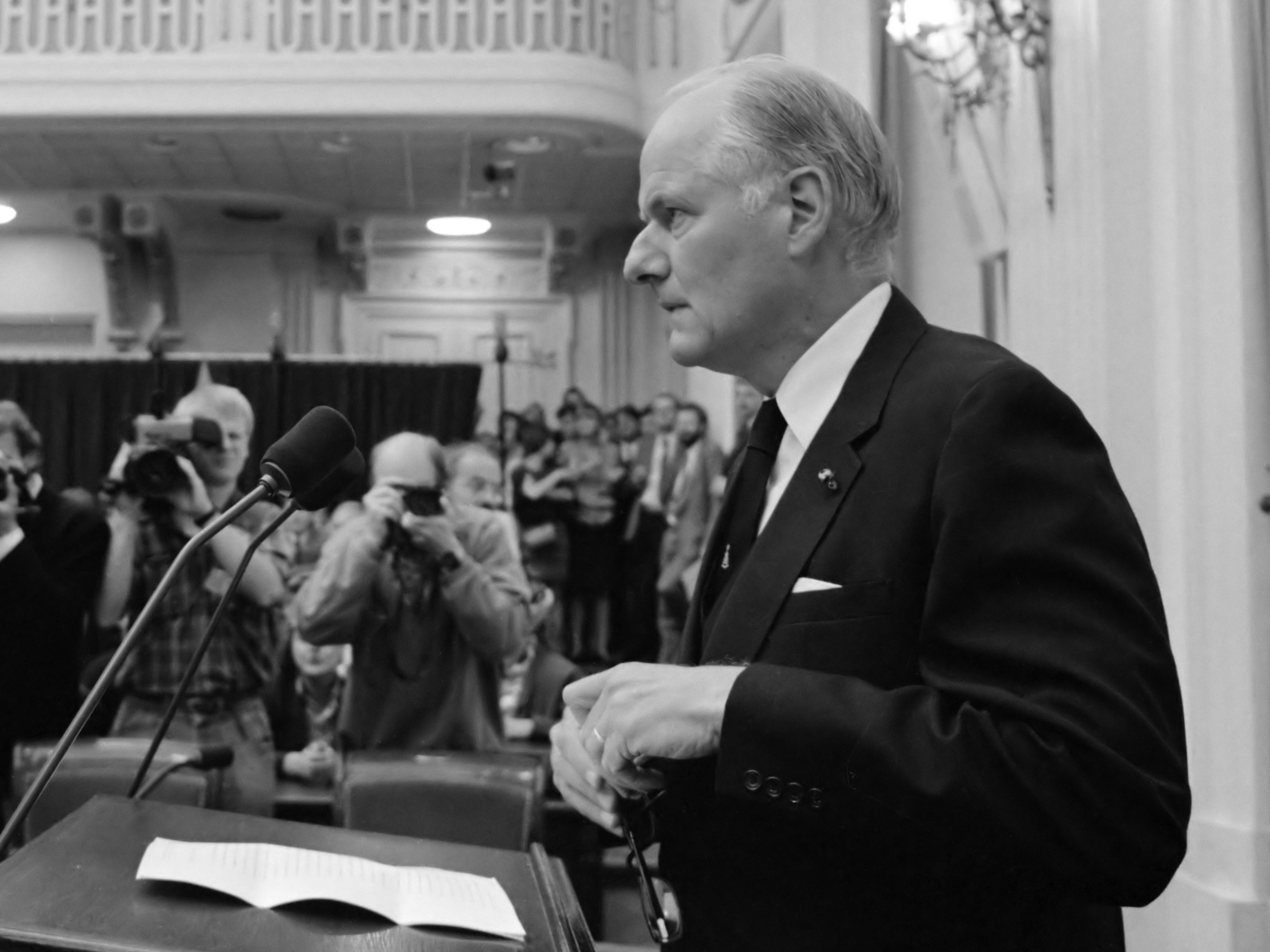 Wim van Eekelen